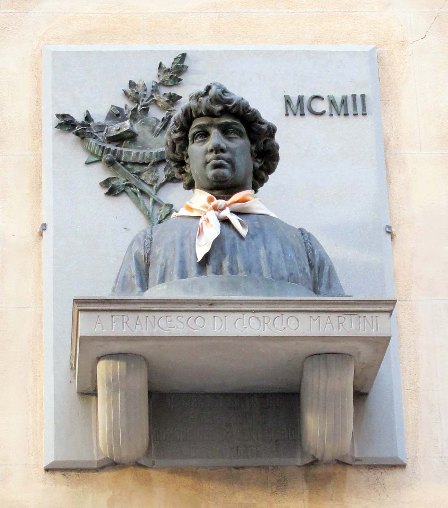 Siena, piazza del Duomo e dintorni